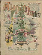 Alma minha!: melodia para piano e canto / poesia de Luiz de Camões ; musica de Amelia Augusta d' Azevedo. - [Lisboa?] : Imp. Nacional, [1880-1881]. - [2] f. : not. mus. ; 38cm